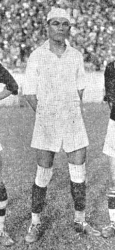 Goleiro Jaguaré Bezerra de Vasconcelos de CR Vasco da Gama ca. 1930